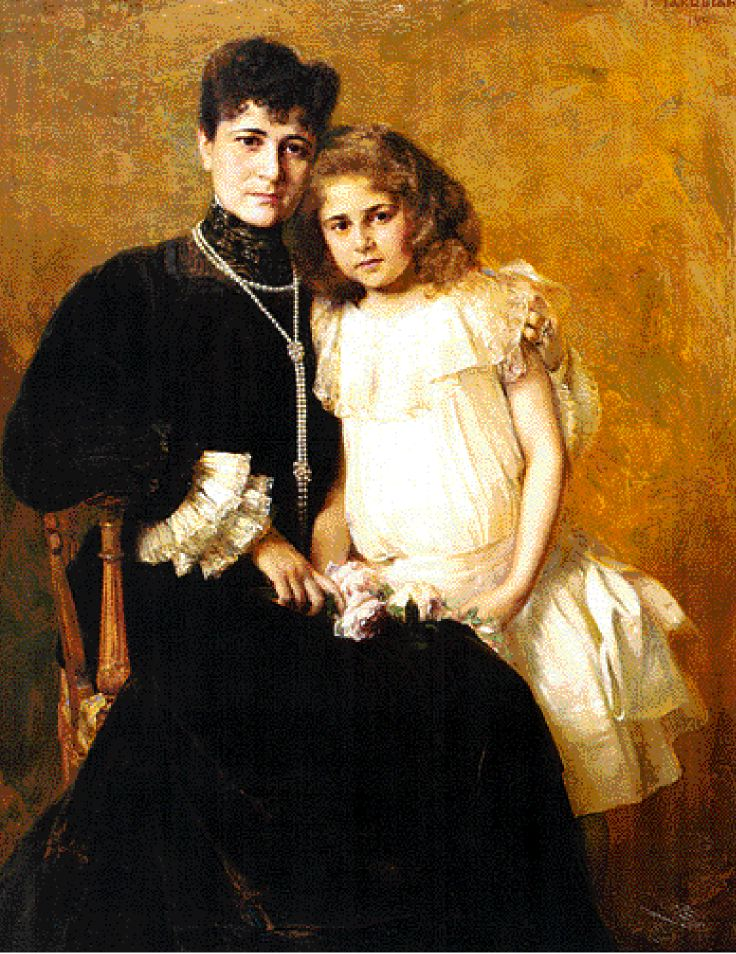 Portrait